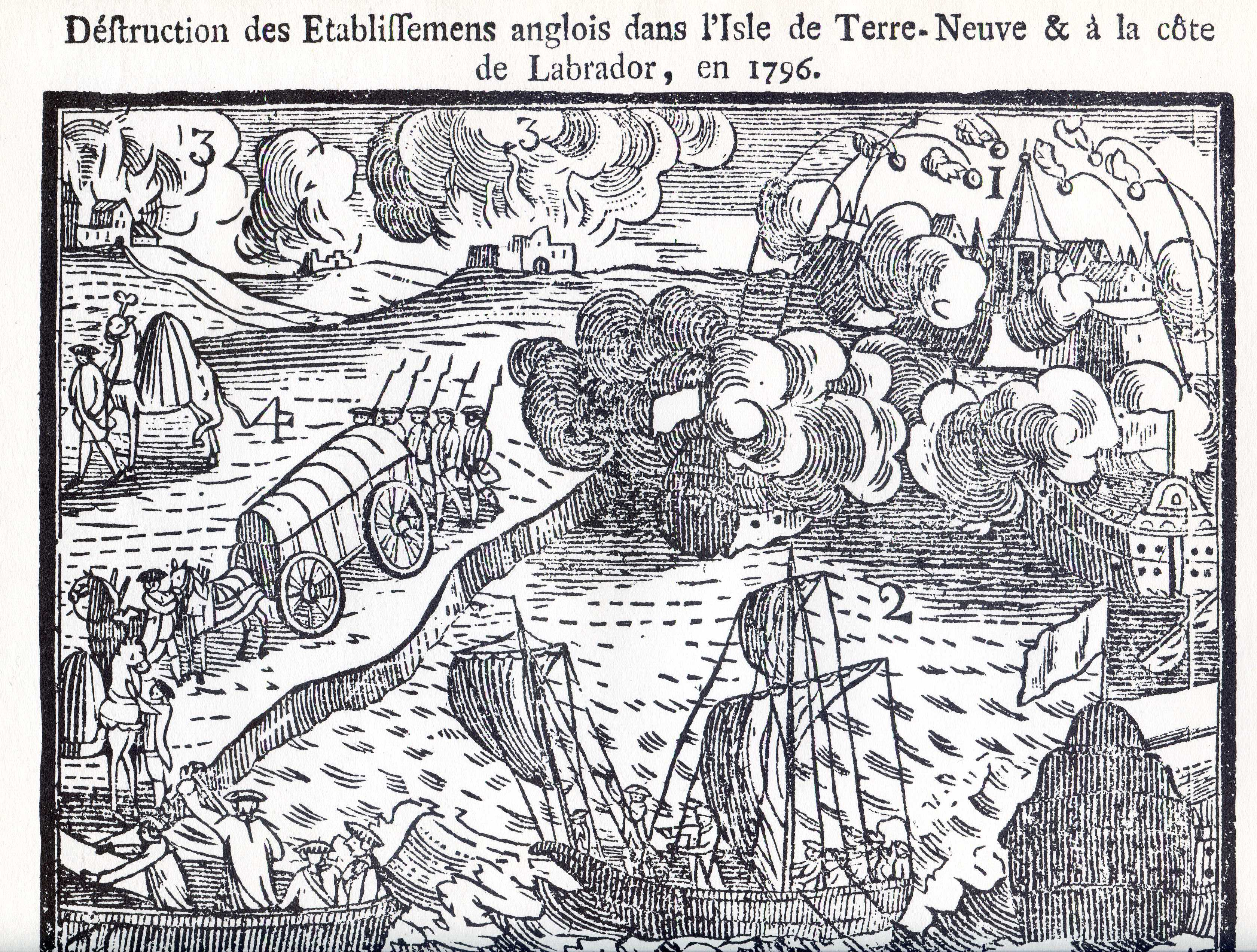 Iconographie illustrant la razzia de la Marine française commandée par le contre-amiral Joseph de Richery sur les établissements anglais de Terre-Neuve en 1796.